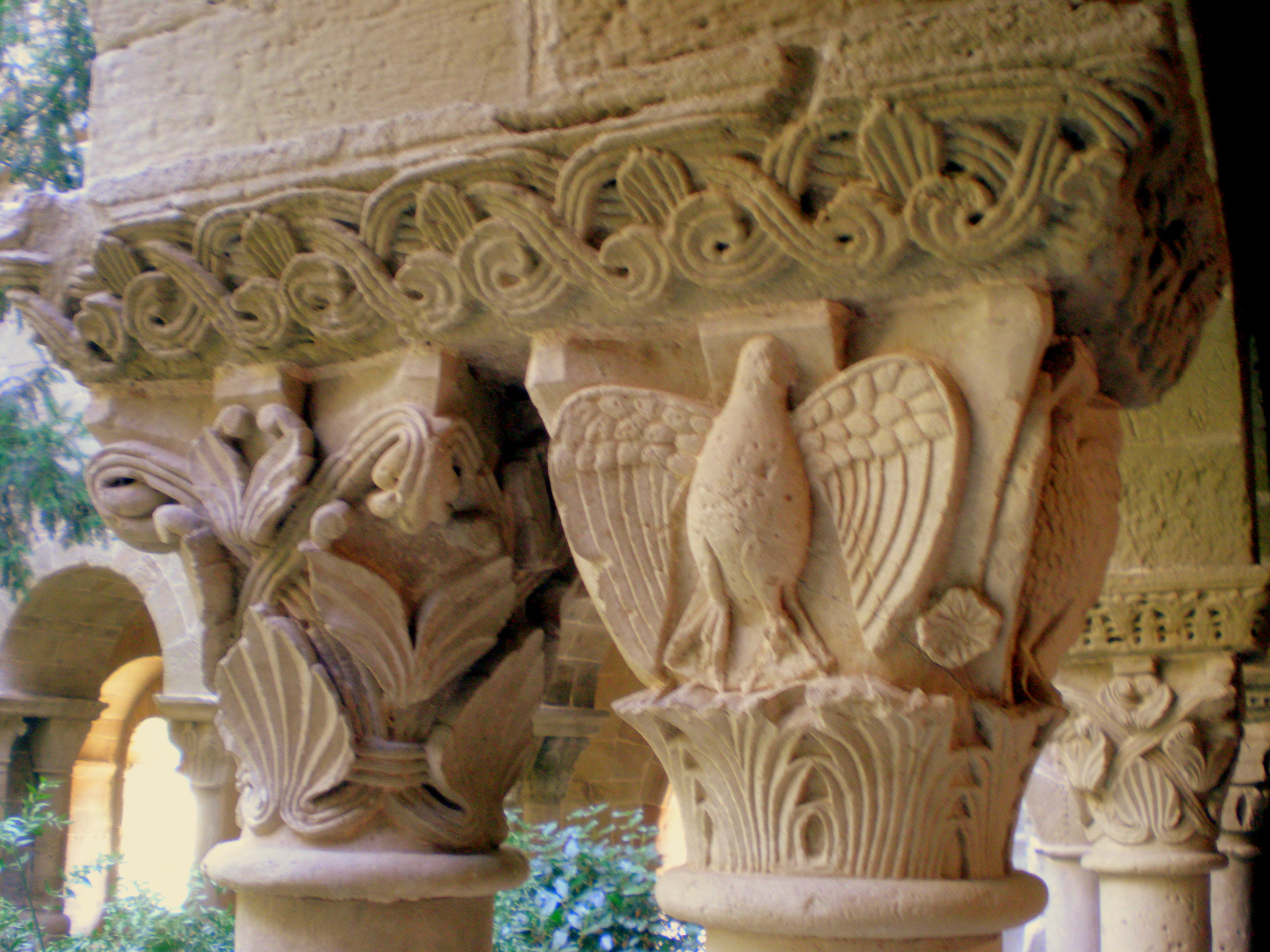 Monestir de Sant Benet de Bages (Sant Fruitós de Bages)